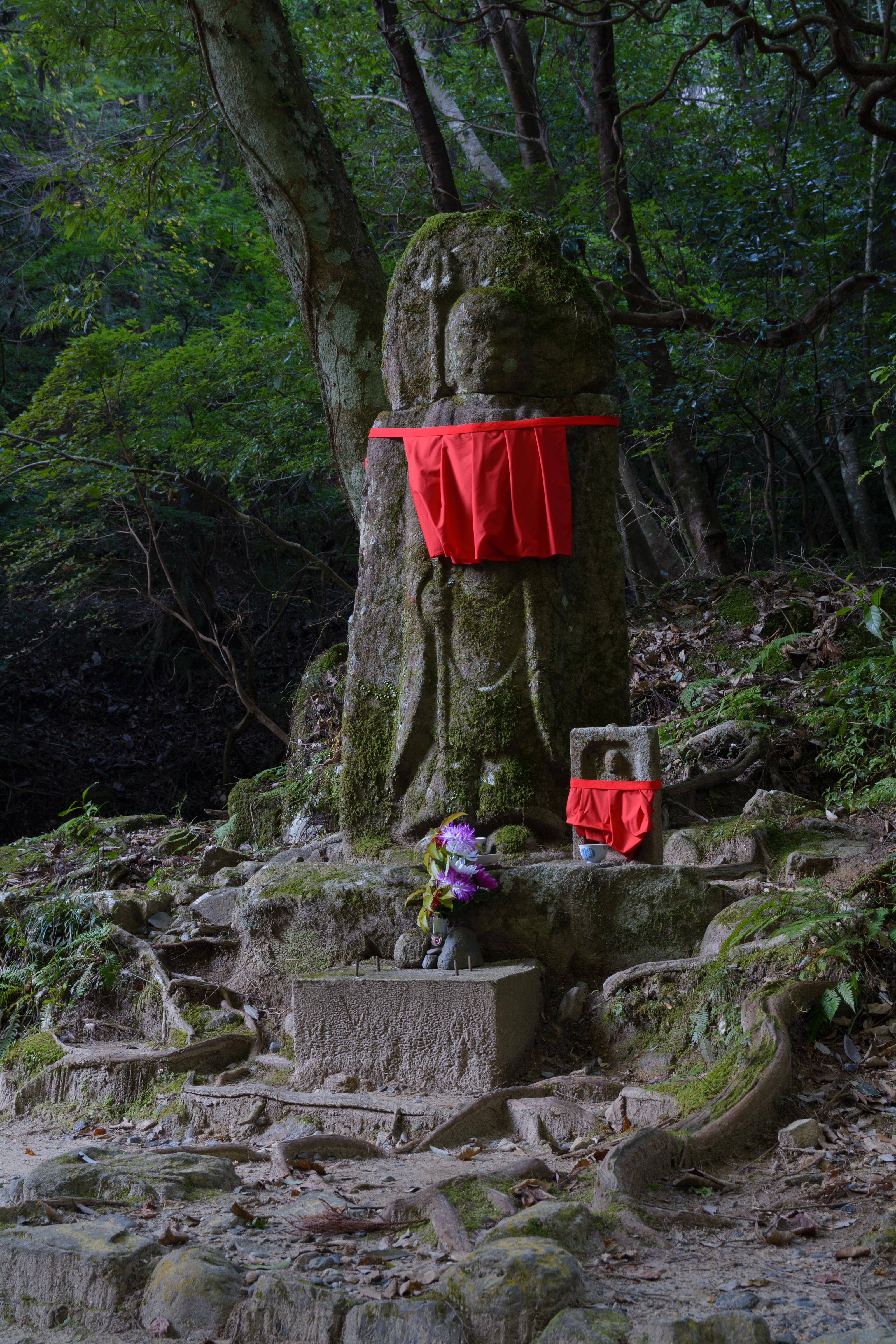 柳生街道首切地蔵